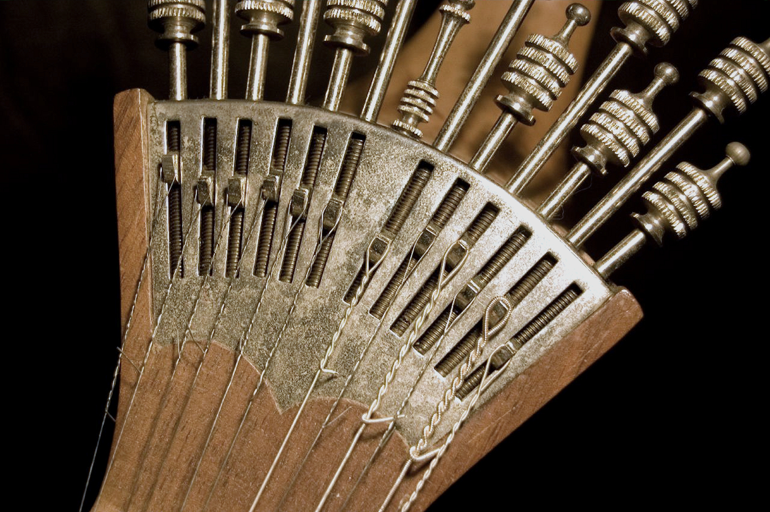 Portuguese Guitar Variations